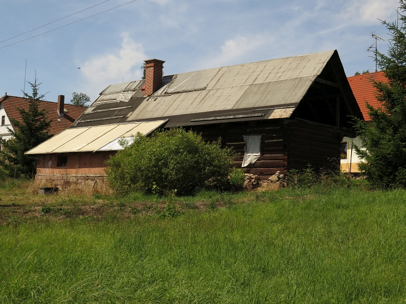 Srub u čp. 24, u čp. 24, Stružinec.